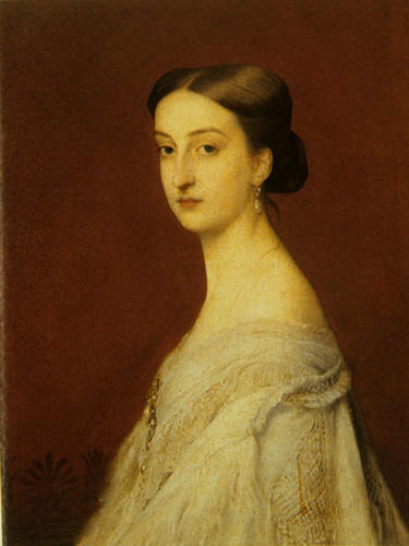 La comtesse de Paris. Portrait de l'infante Maria Isabella de Orleans y Borbon. Musée Louis Philippe, Eu, Numéro d'inventaire: 1996.26.2